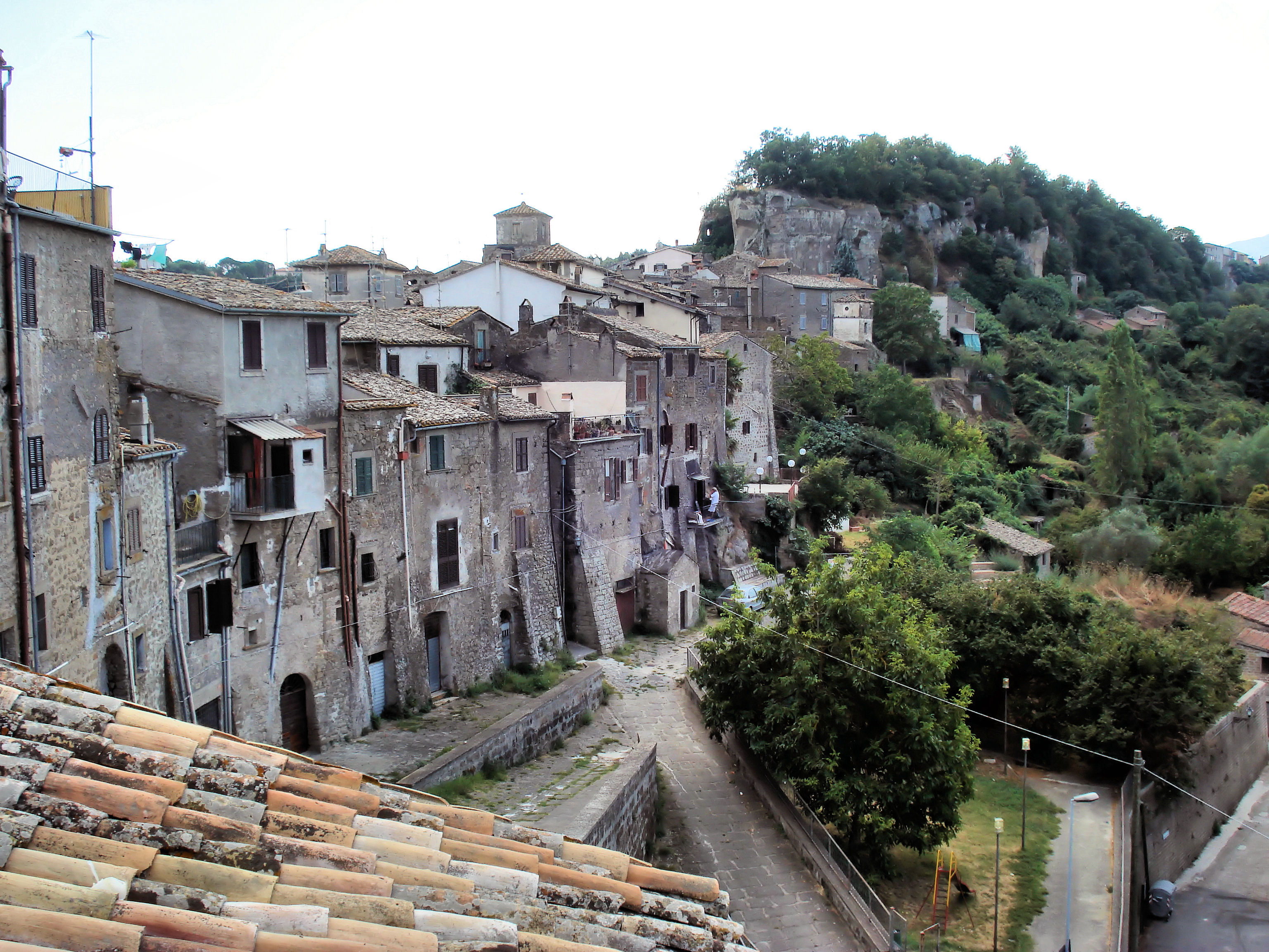 Cosmin latan,Bomarzo Licensing Categoria:Immagini esclusivamente in GNU FDL